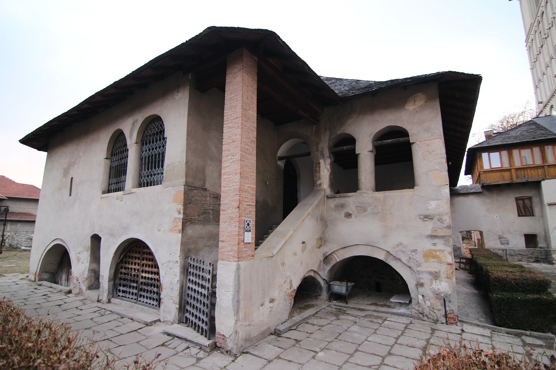 Casa domnească/arhierească la Negru Vodă 04